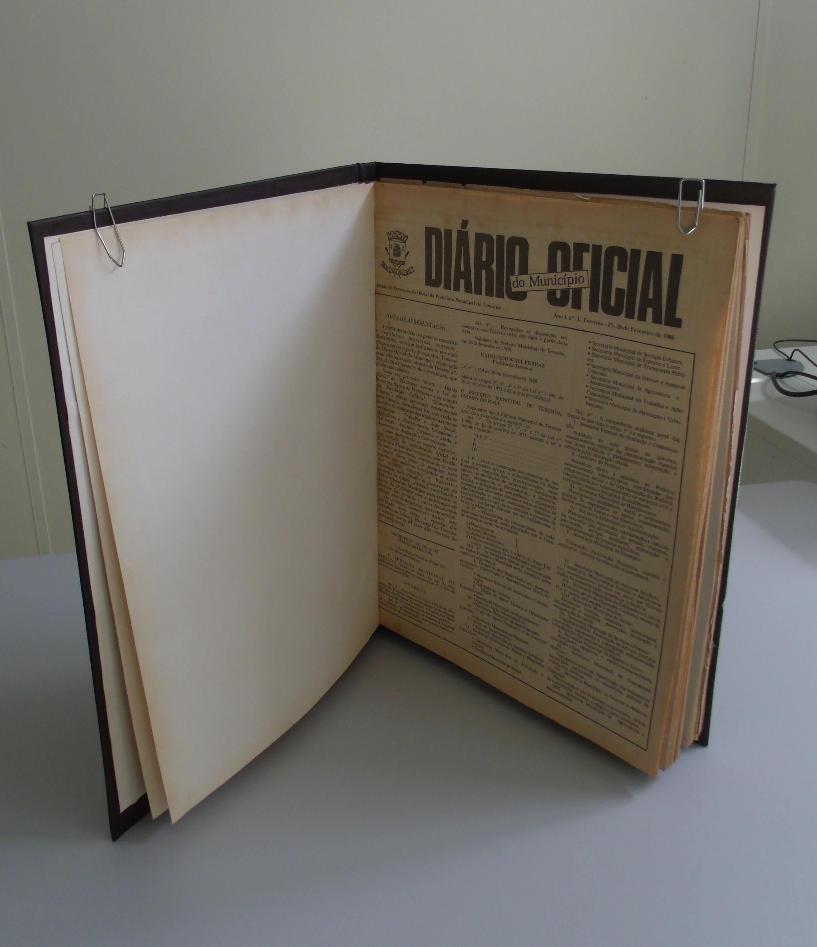 Encadernação com a edição número 1 do Diário Oficial do Município de Teresina.